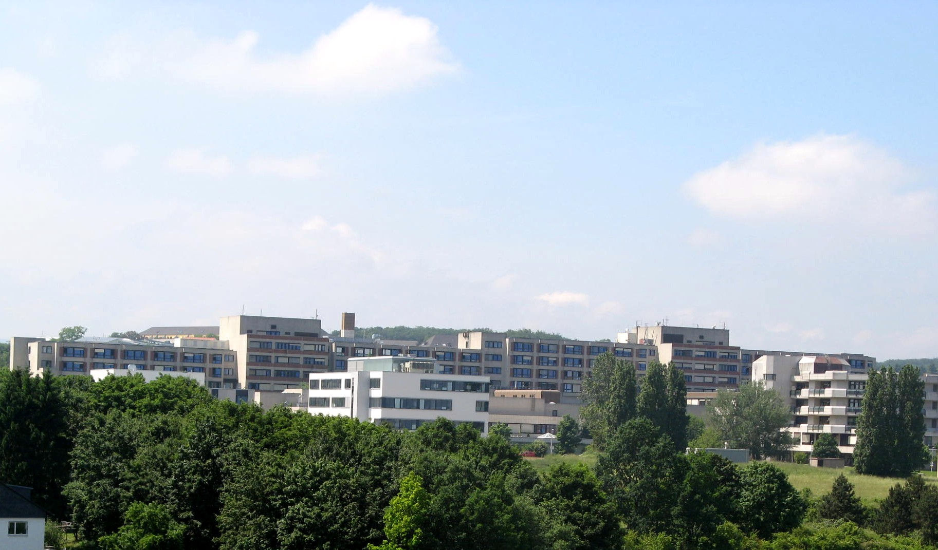 Die Dr. Horst-Schmidt-Kliniken in Wiesbaden von einem Riesenrad der Freudenberger Kerb fotografiert.